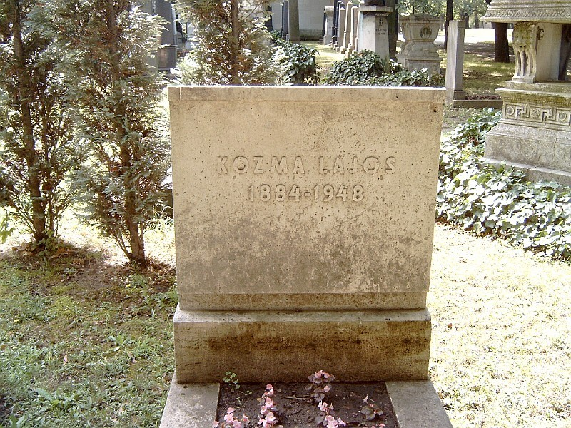 Kozma Lajos sírja Budapesten. Kerepesi temető: 34/2-2-1.